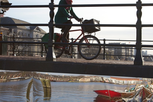 Gemonteerde foto van Titia Ex